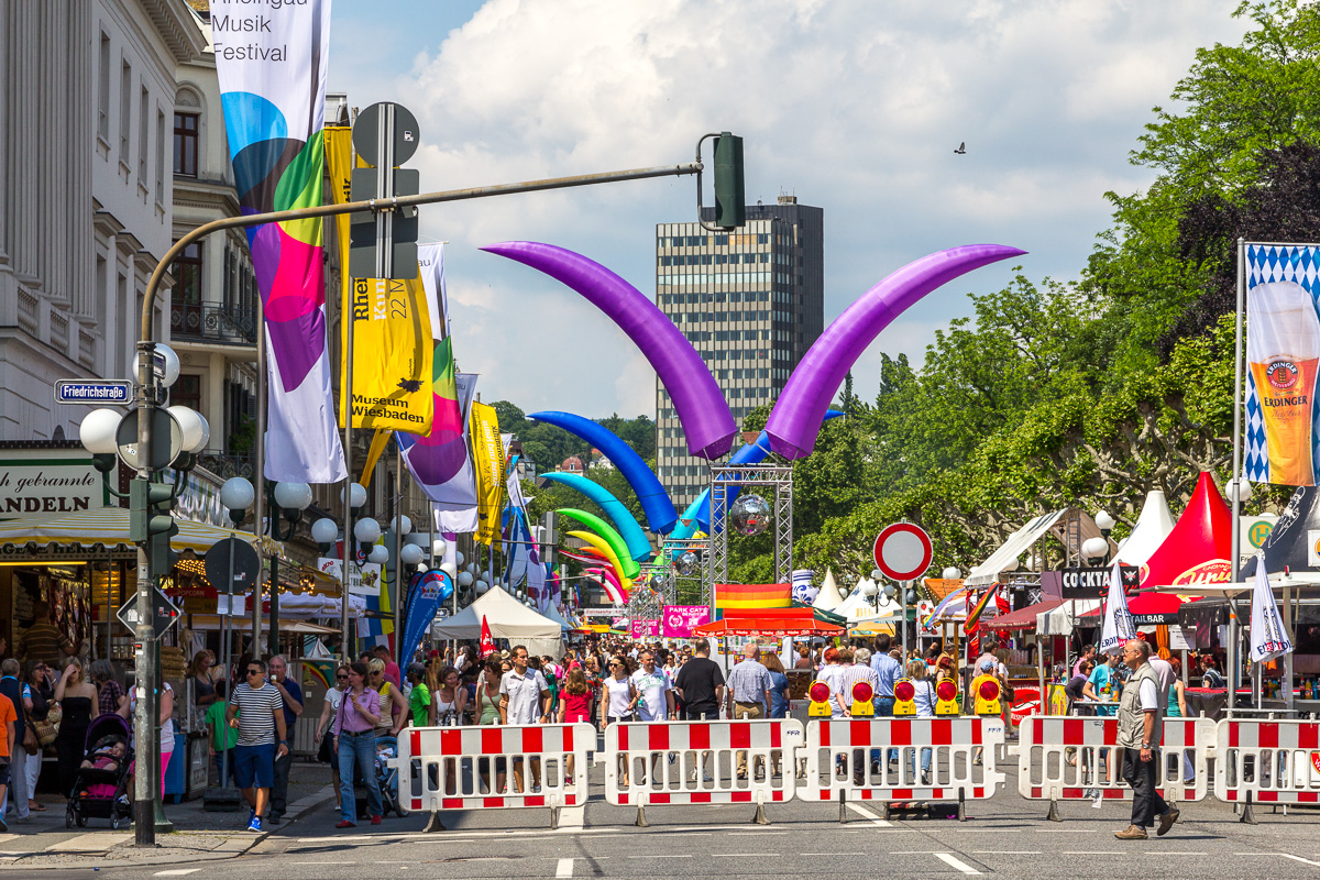 Wilhelmstraßenfest 2013